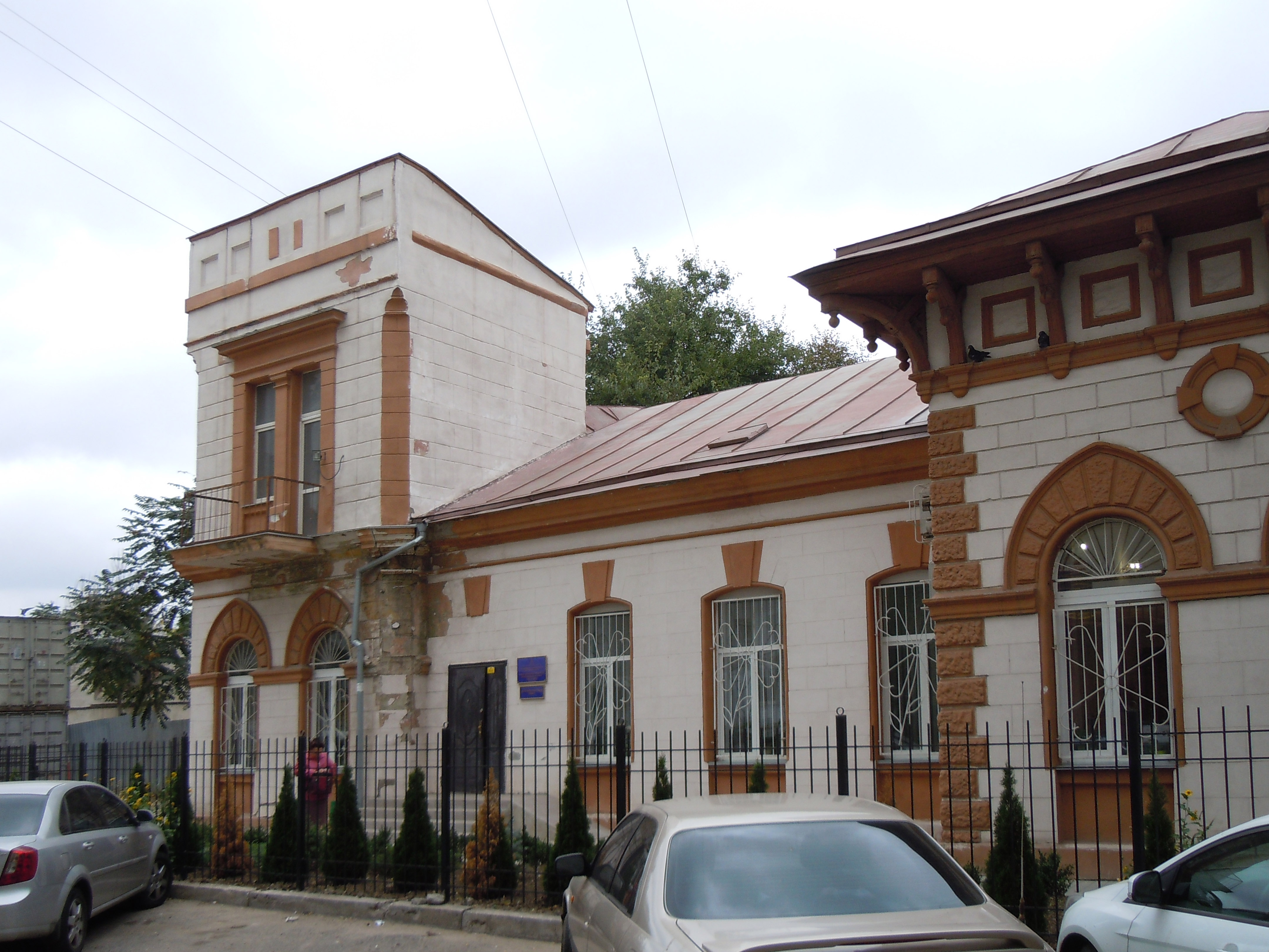 Особняк, Одеса, Середньофонтанська вул., 30б